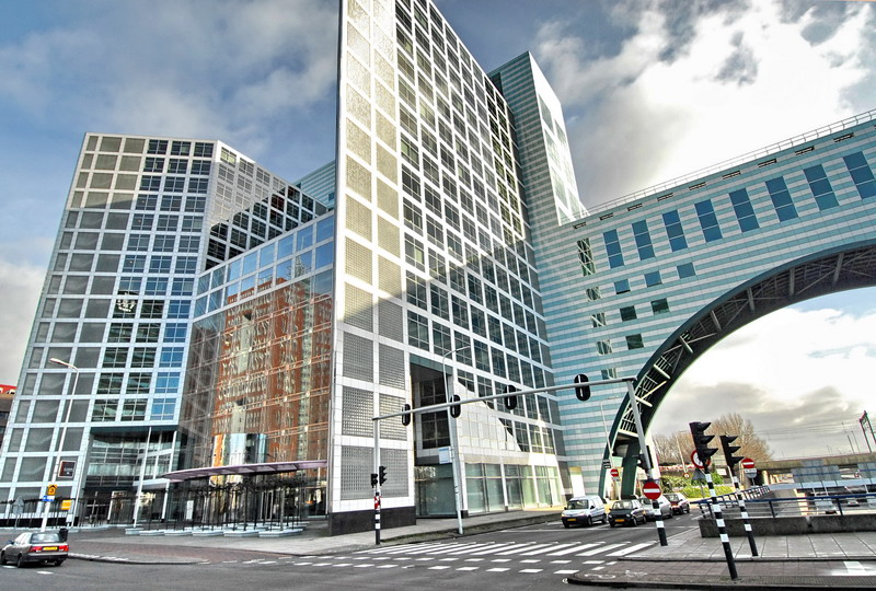 Haagse vestiging van Nationale Nederlanden is naast en over de Utrechtsebaan (A12 Utrecht-Den Haag) heen gebouwd. Het gebouw wordt 'De Haagse Poort' genoemd.